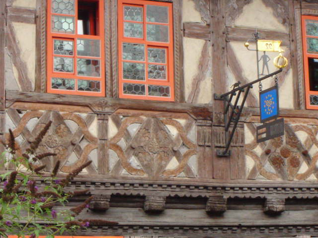 Fachwerkelemente Henneberer Fachwerk Suhl-Heinrichs